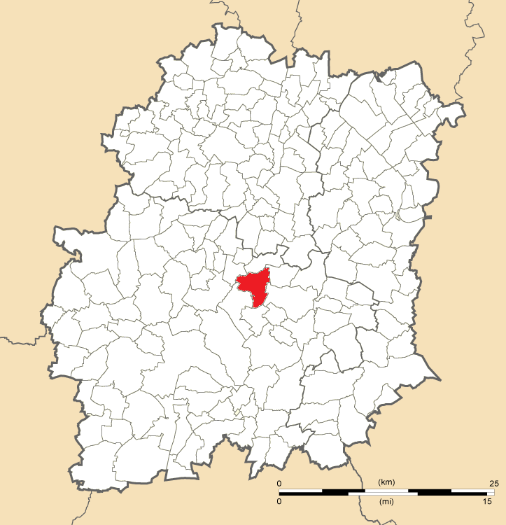 Carte de position de Janville-sur-Juine en Essonne (91)